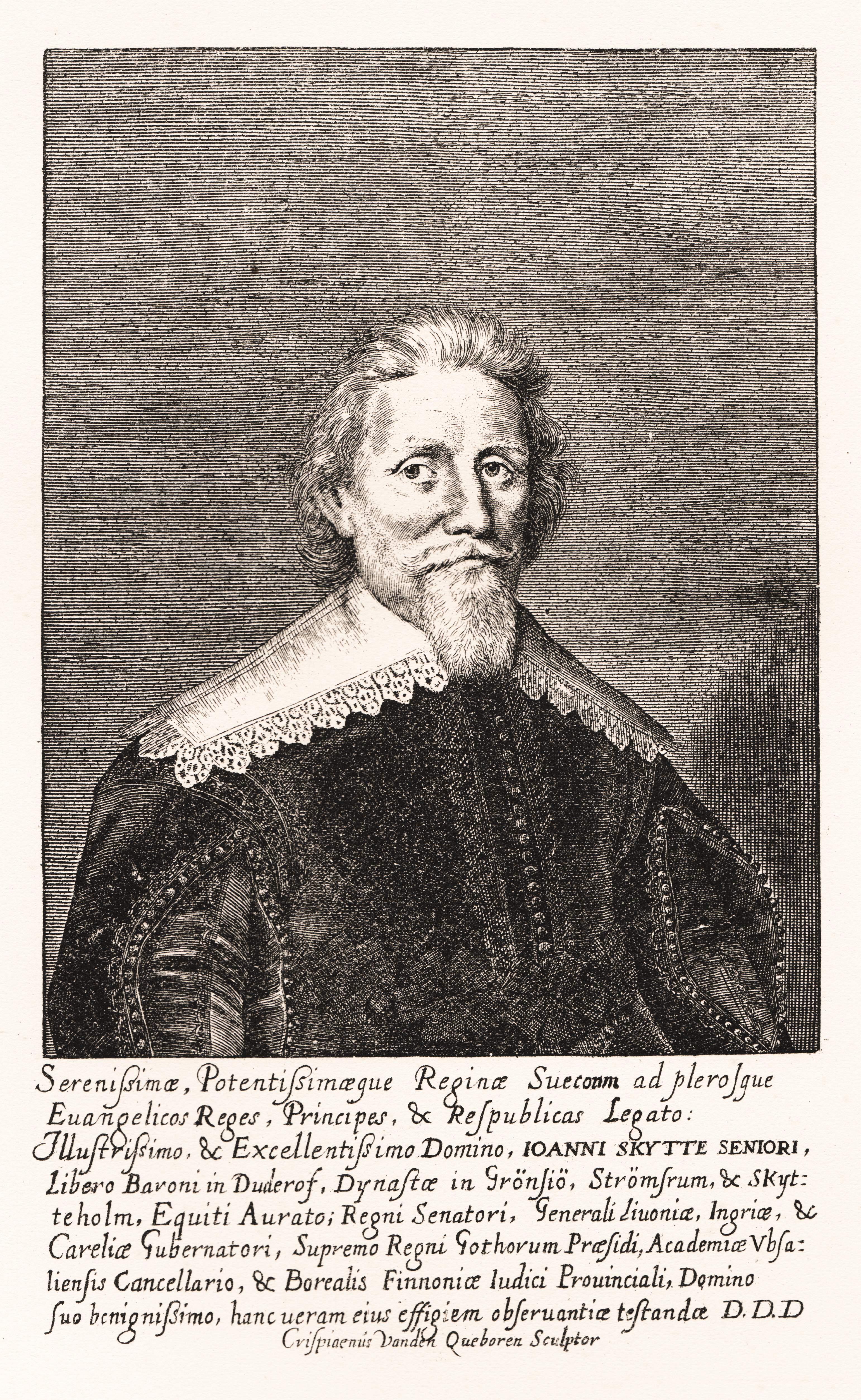 Johan Skytte (1577-1645). Gravyren är utförd af en framstående kopparstickare och (målare?) Crisp. van den Queboren (1604-1653?), som kan räknas till Skyttes samtida.